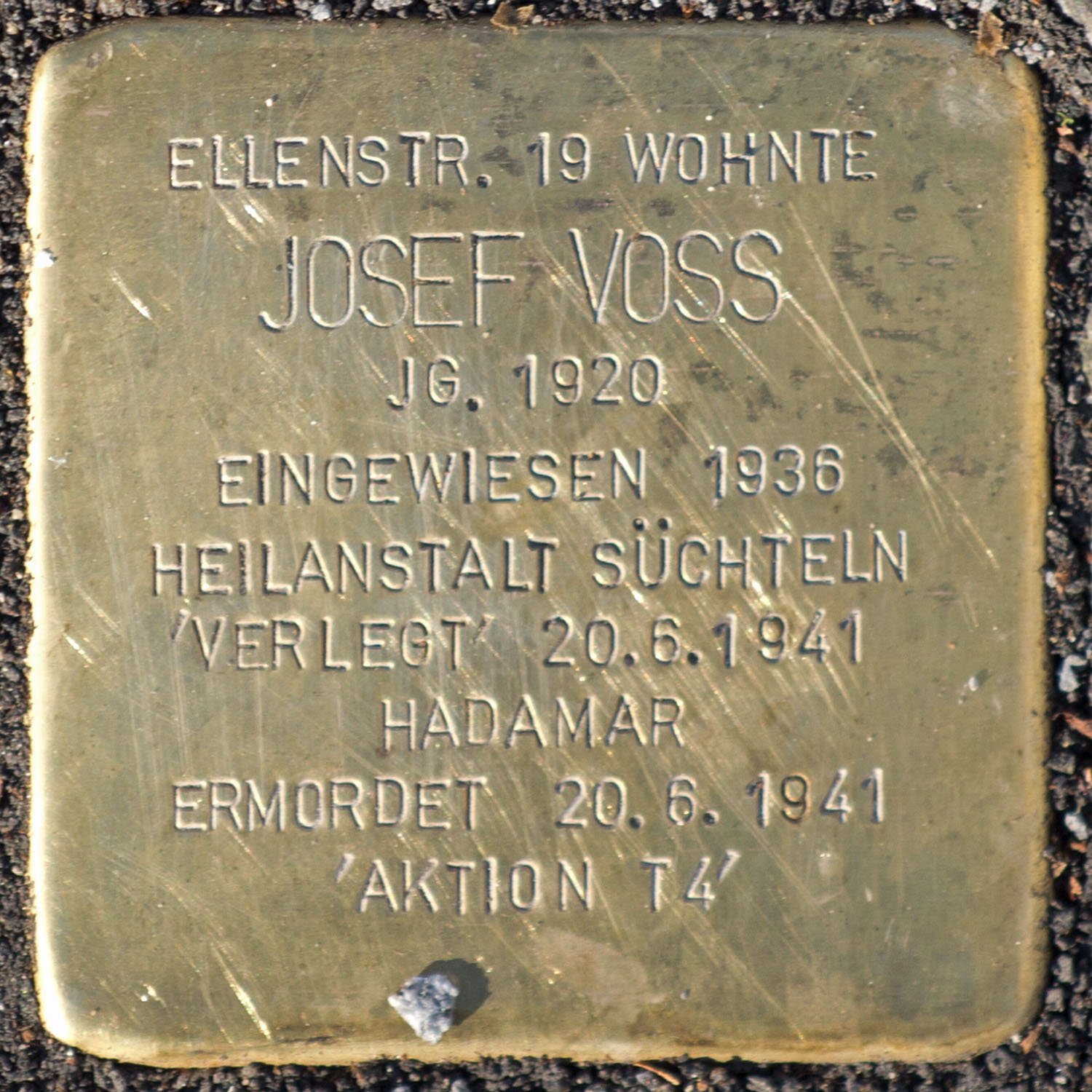 Stolpersteine in Kempen: Josef Voss, Ellenstr. 19